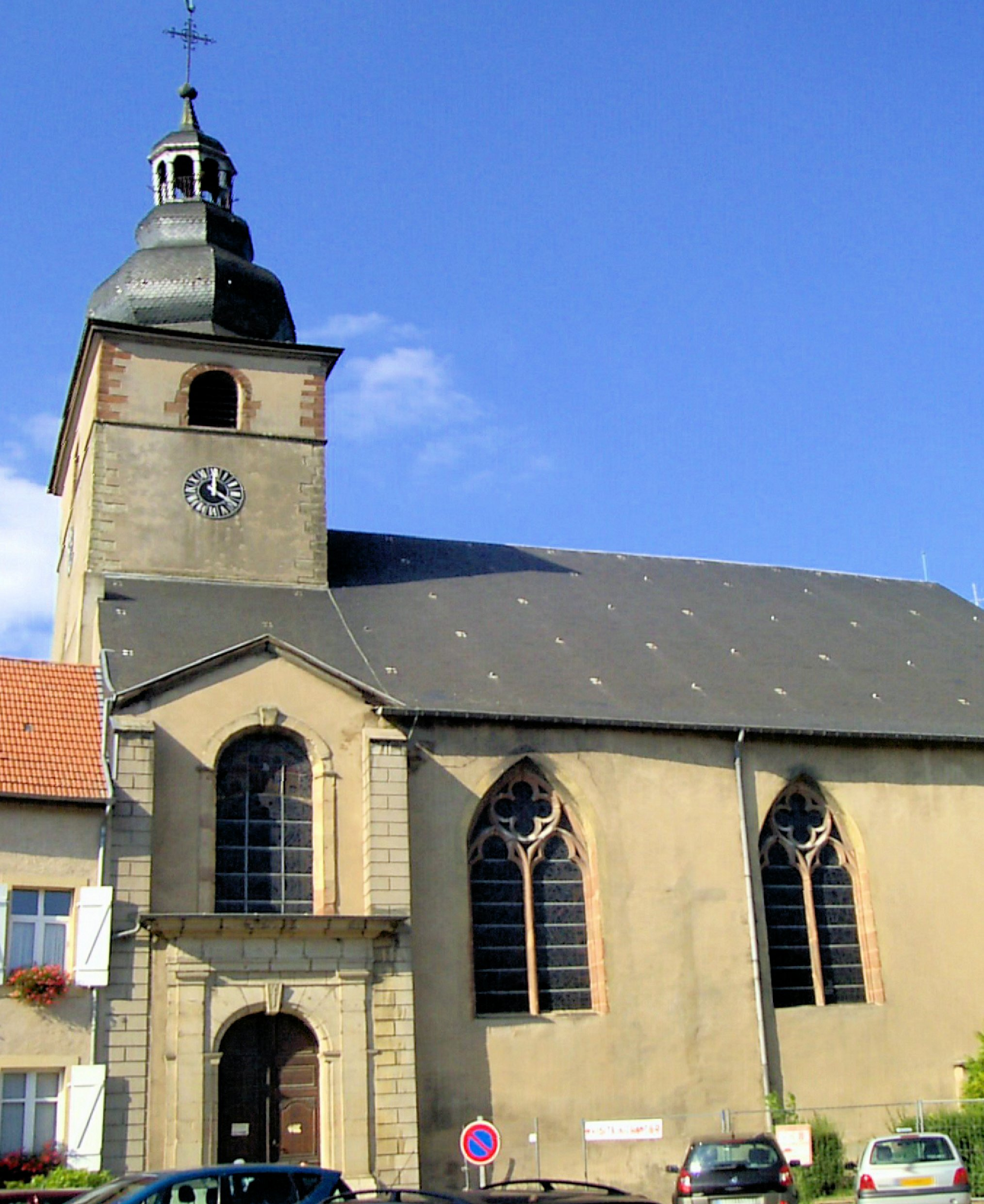 Abbaye Sainte-Croix de Bouzonville